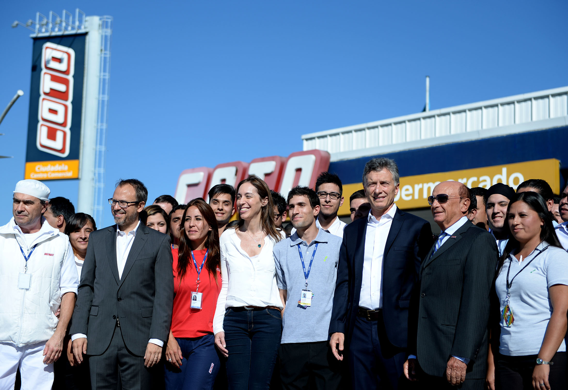 El presidente Mauricio Macri anunció inversiones en la ciudad de Buenos Aires y el conurbano bonaerense por 3500 millones que serán realizadas por la empresa de supermercados Coto.